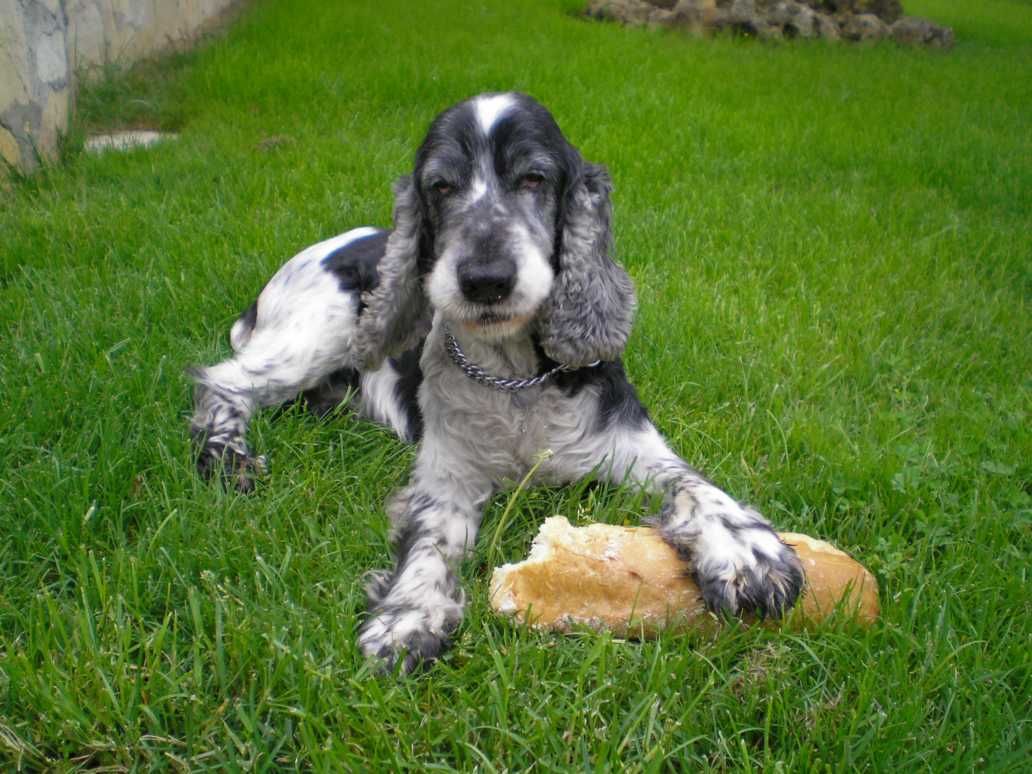 Cocker blanco y negro de 13 años